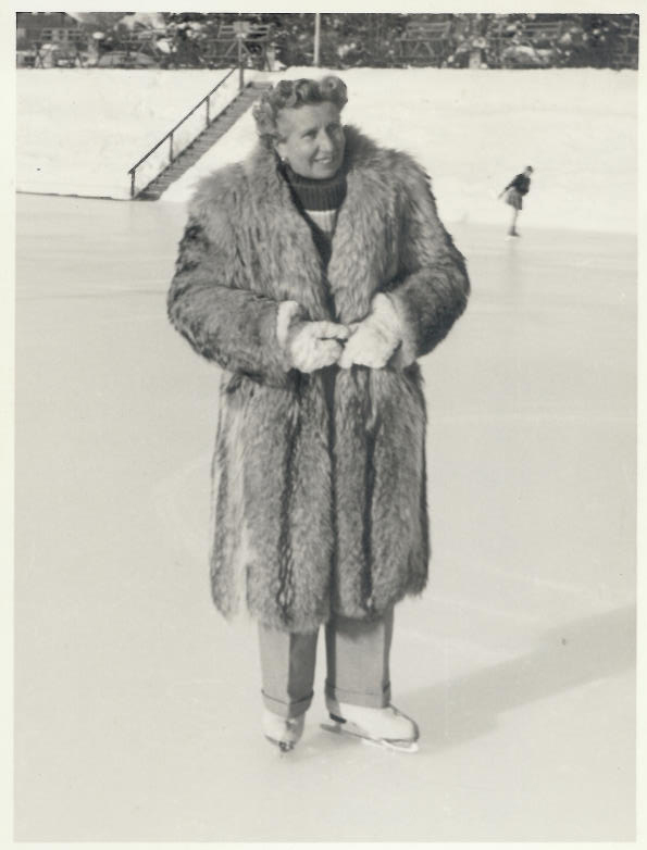 Thea Frenssen, professeur de patinage